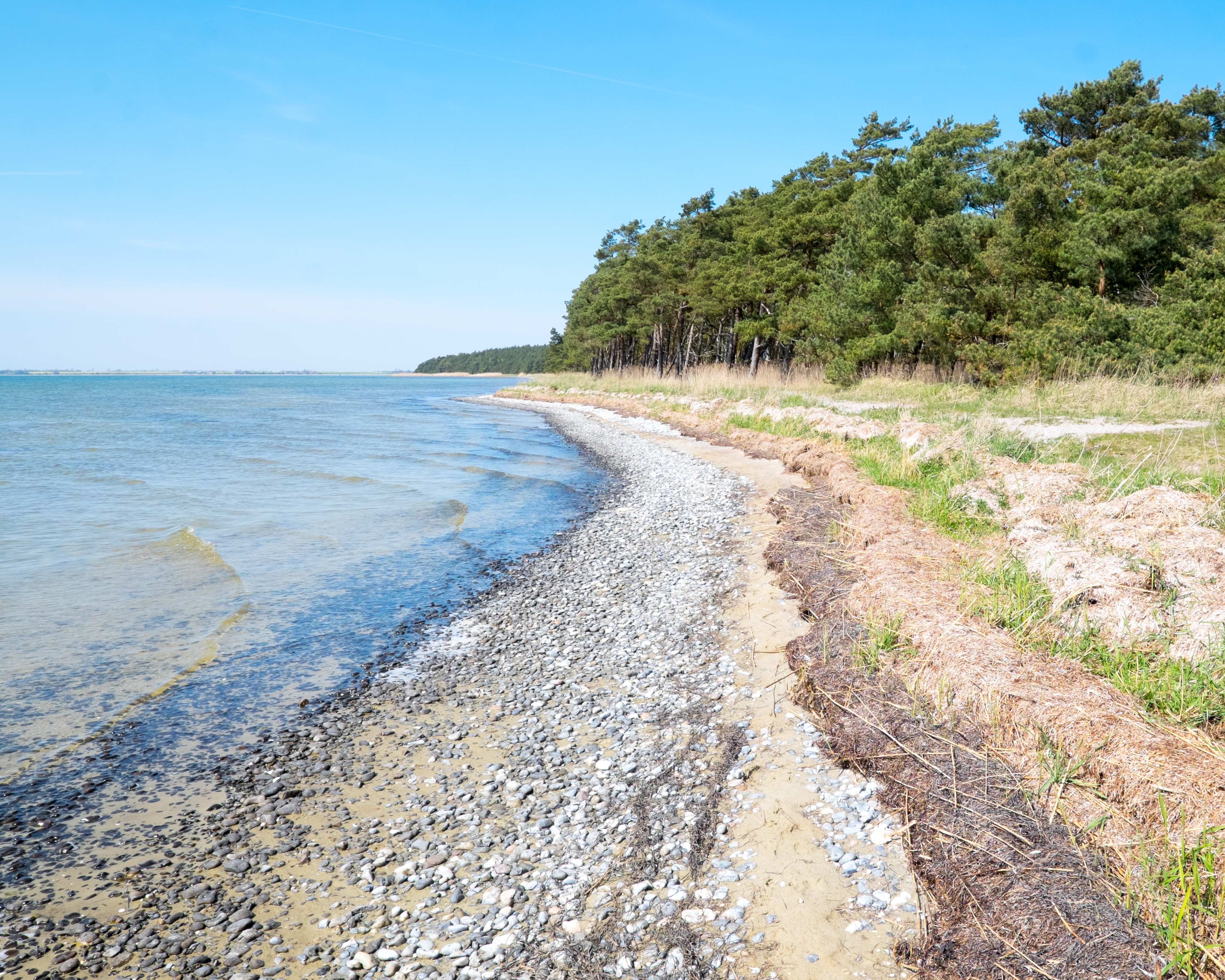 Ufer beim Langen Moor (N 253)